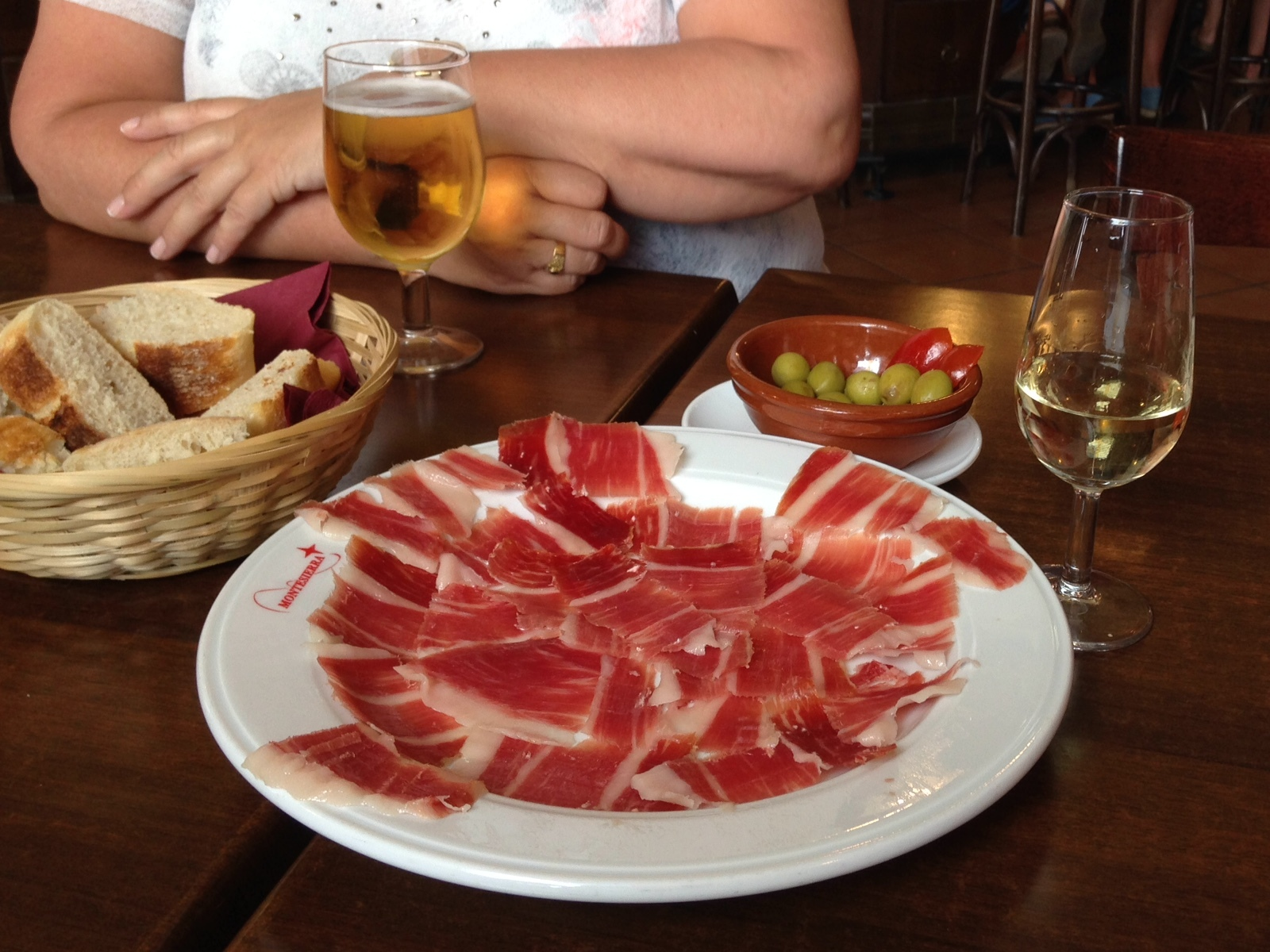 Plato con jamón de Jabugo servido en Jabugo Huelga Andalucía España